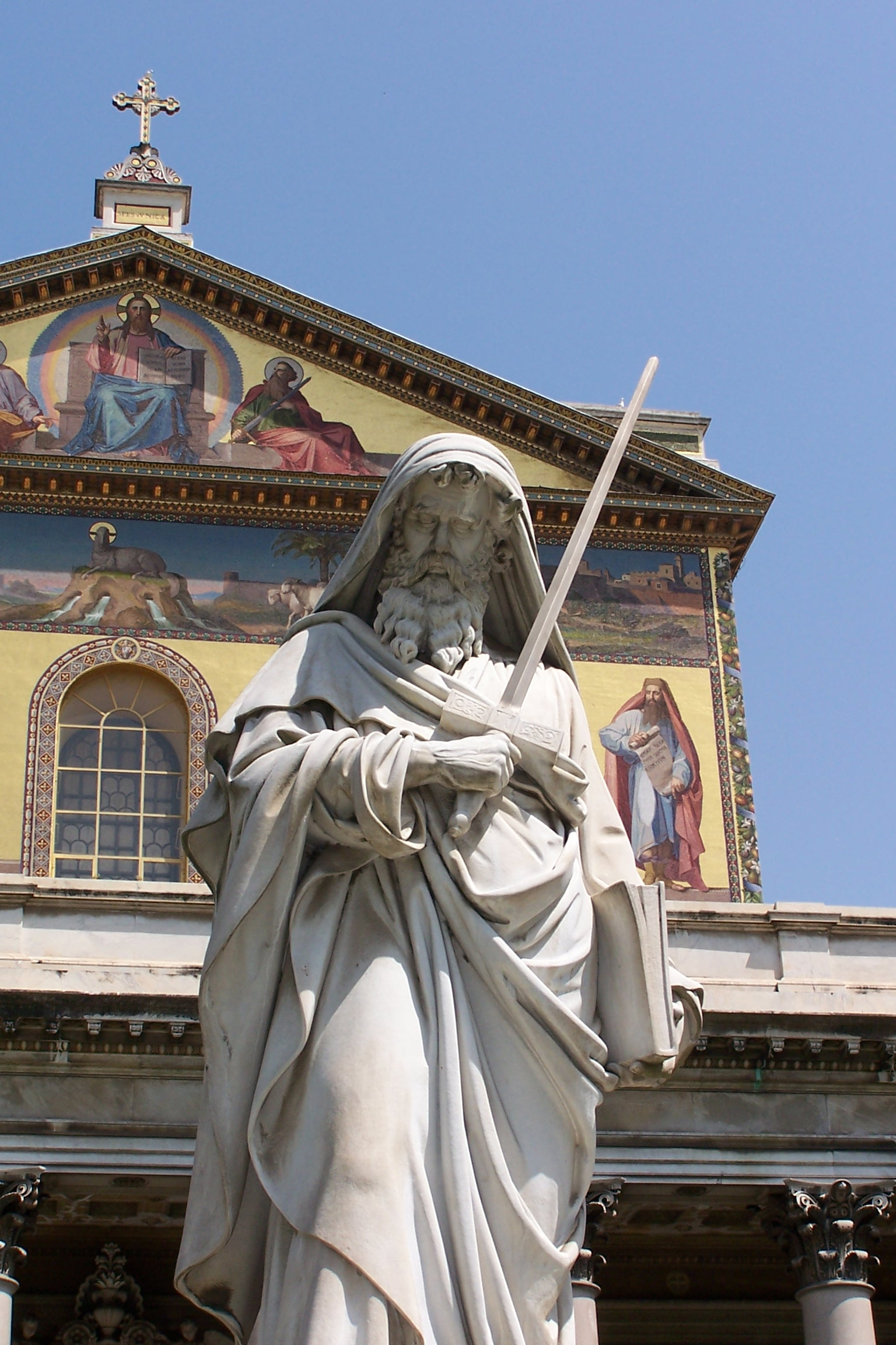 Rom, Sankt Paul vor den Mauern, (San Paolo fuori le mura) Statue des Paulus